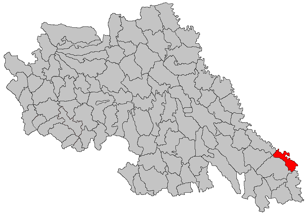 Categorie:Hărţi ale judeţului Iaşi